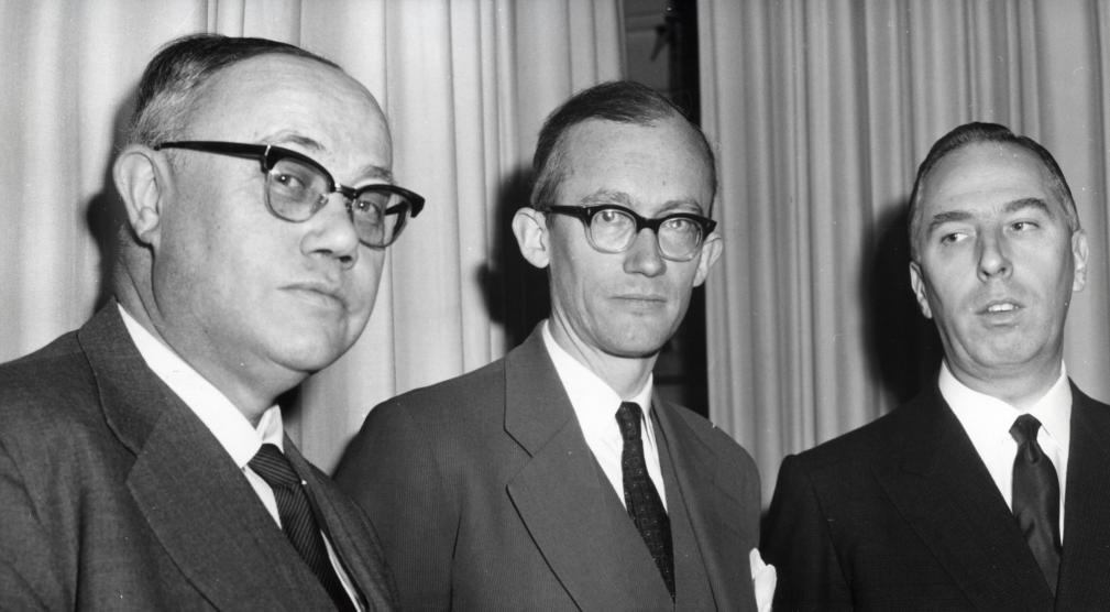 Staatssecretaris van Verkeer en Waterstaat E.G. Stijkel (rechts) in het kabinet De Quay. Nederland, Amsterdam, 26 januari 1963.